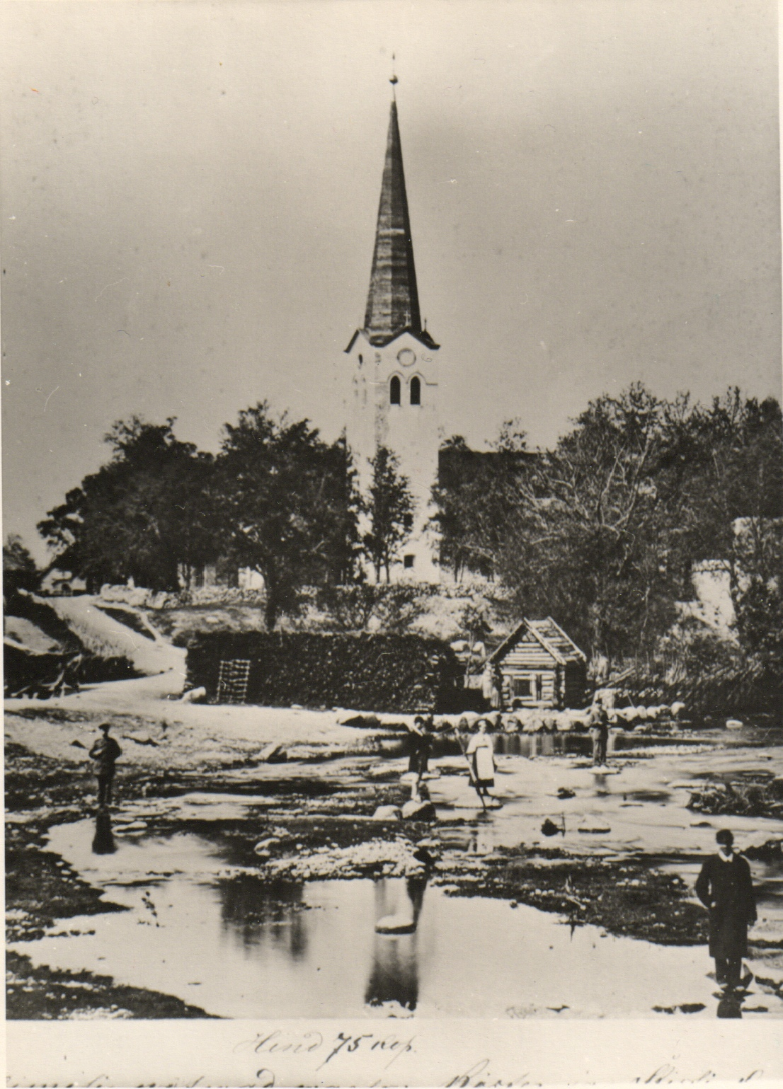 Kose kirik 19. ja 20. sajandi vahetusel. Pirita jõgi on veel süvendamata ja pildil on näha ka jõe ääres asunud saun.